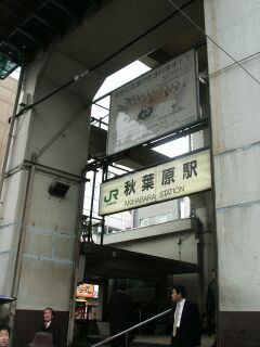 秋葉原駅昭和通り口